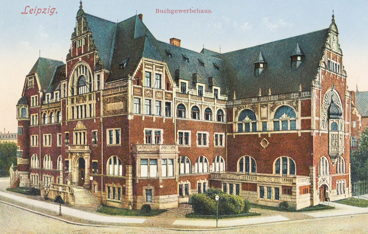 Das Buchgewerbehaus in Leipzig auf einer zeitgenössischen Postkarte